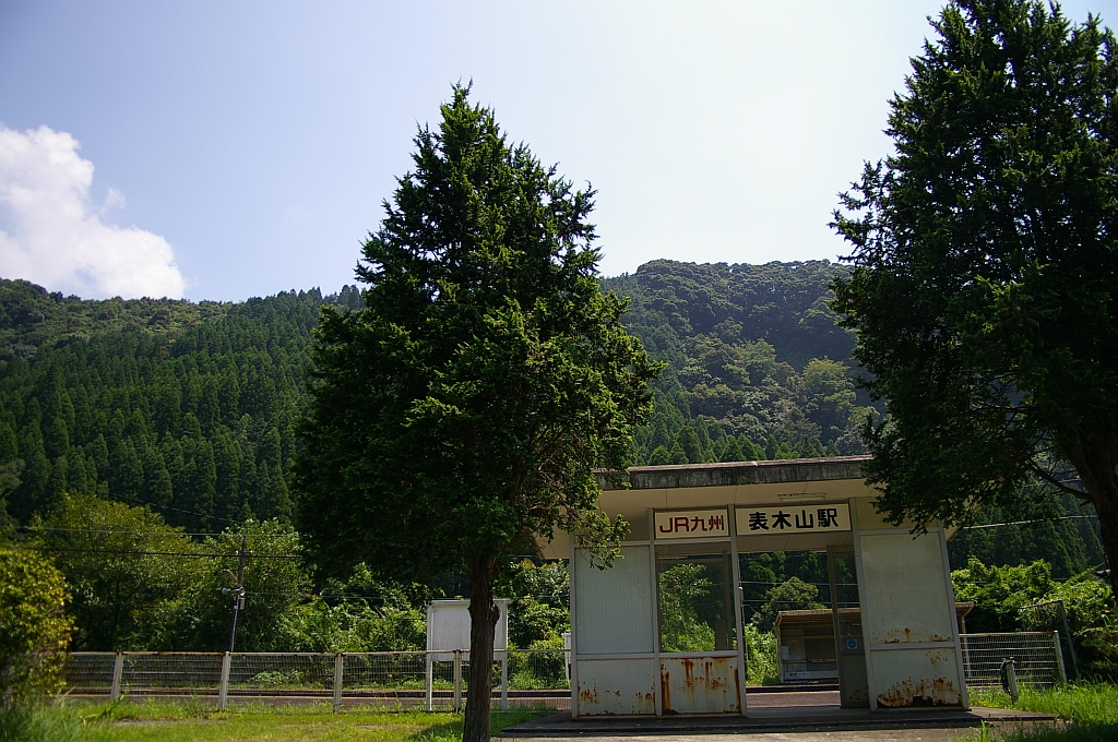 撮影：takasunrise0921